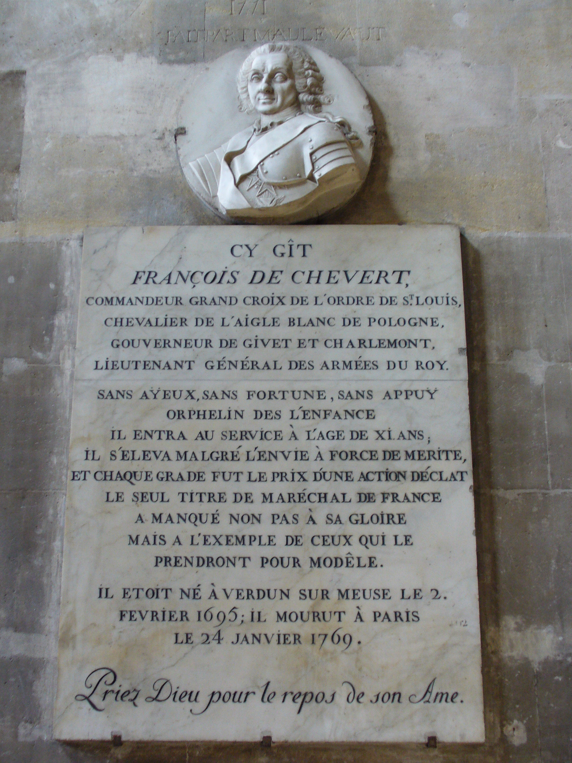 François de Chevert (Eglise Saint-Eustache)